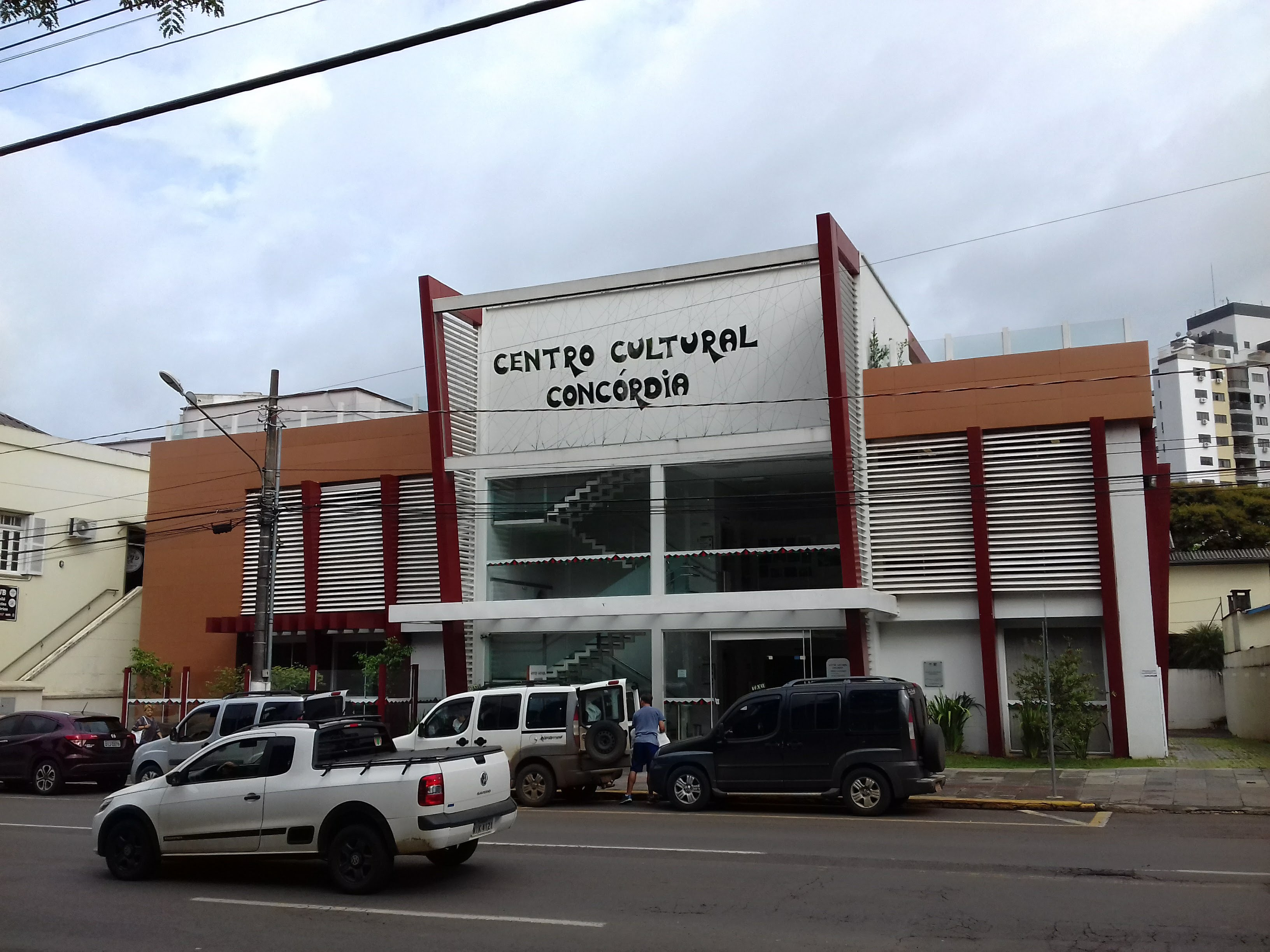 Fachada - Centro de Cultura, Concórdia - SC